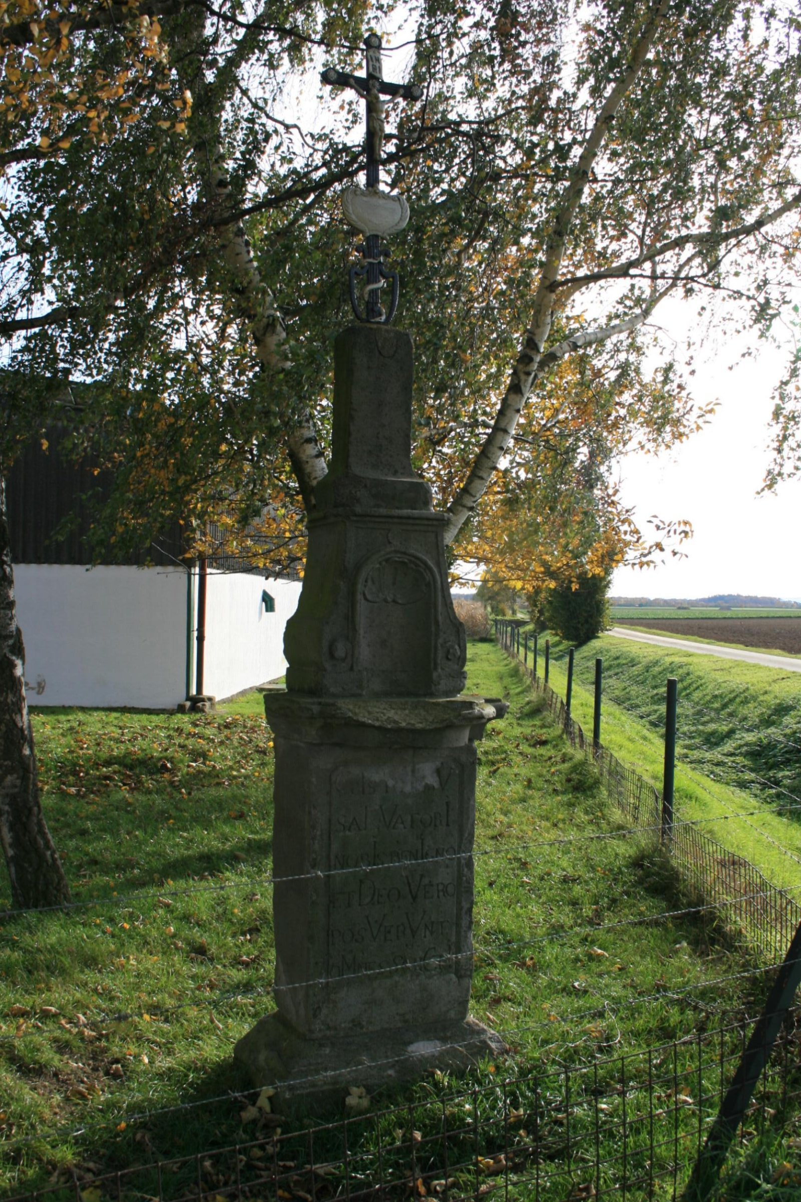 Das Wegekreuz am Ortsausgang Gladbacher Str. in Nörvenich-Poll